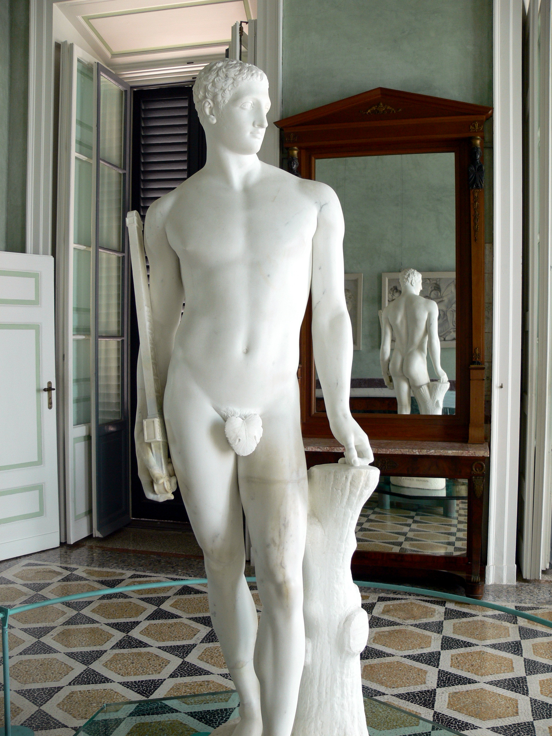 Villa Carlotta in Tremezzo ( Lago di Como ). Statue des Palamedes von Antonio Canova.